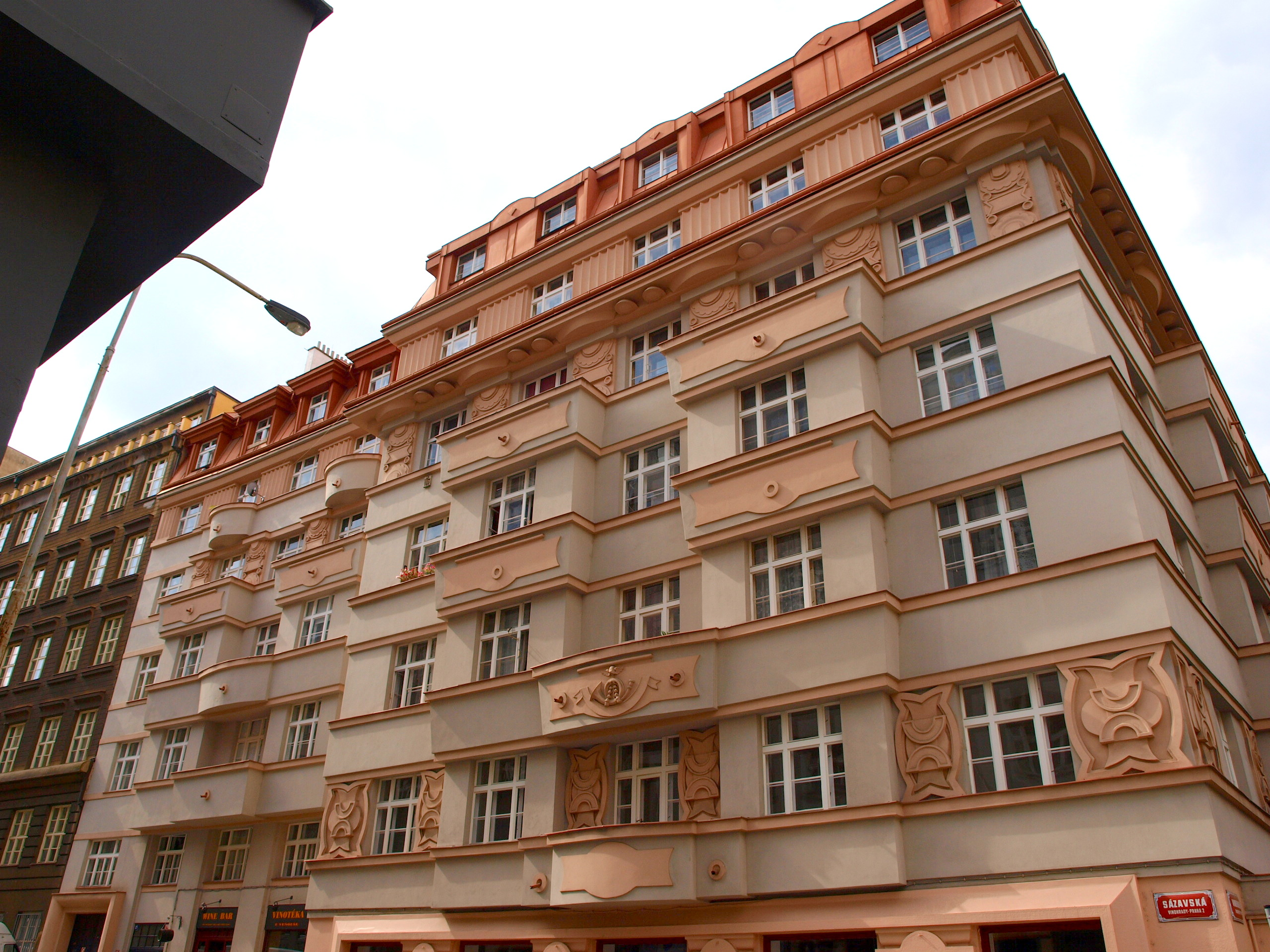 Radiopalác Vinohradská